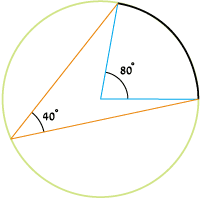 גודלה של זווית היקפית הנשענת על קשת הוא חצי מגודל הזווית המרכזית הנשענת על קשת זו.